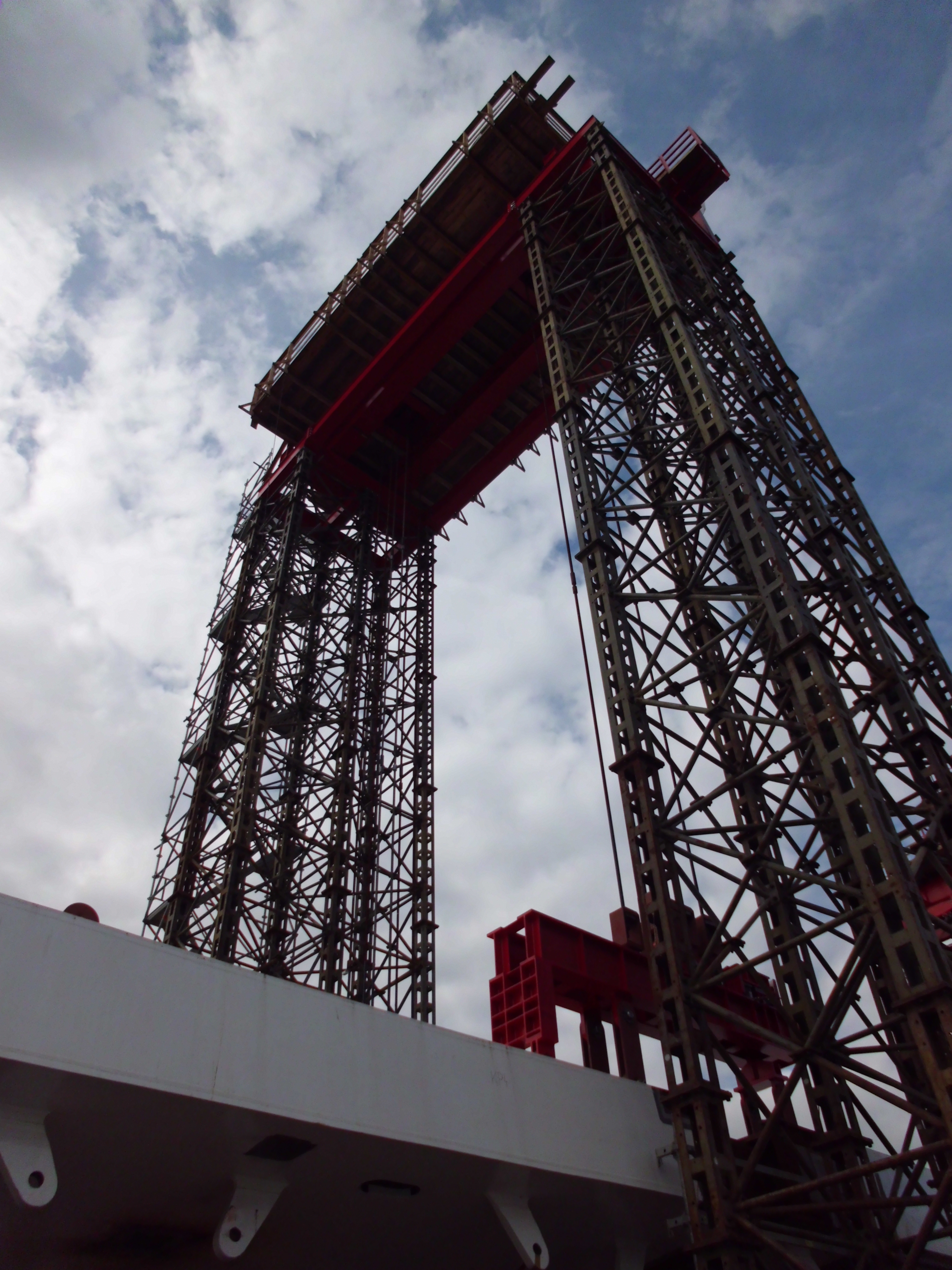 Tunel Blanka 28.9.12